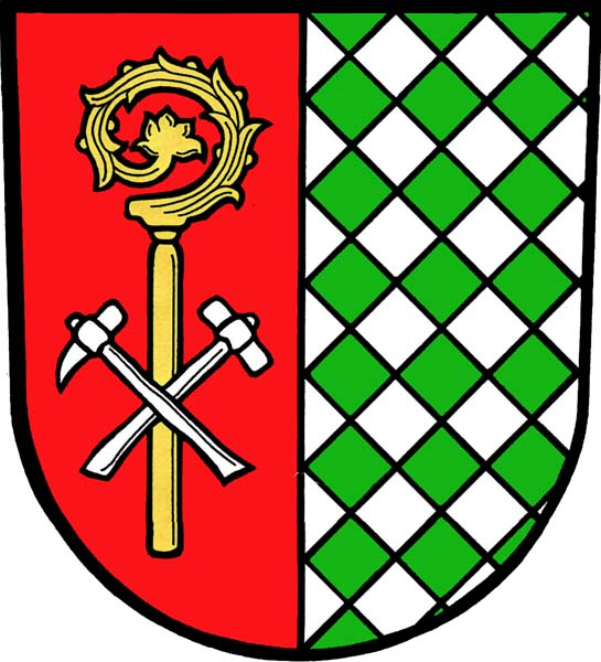 Znak obce Horní Životice